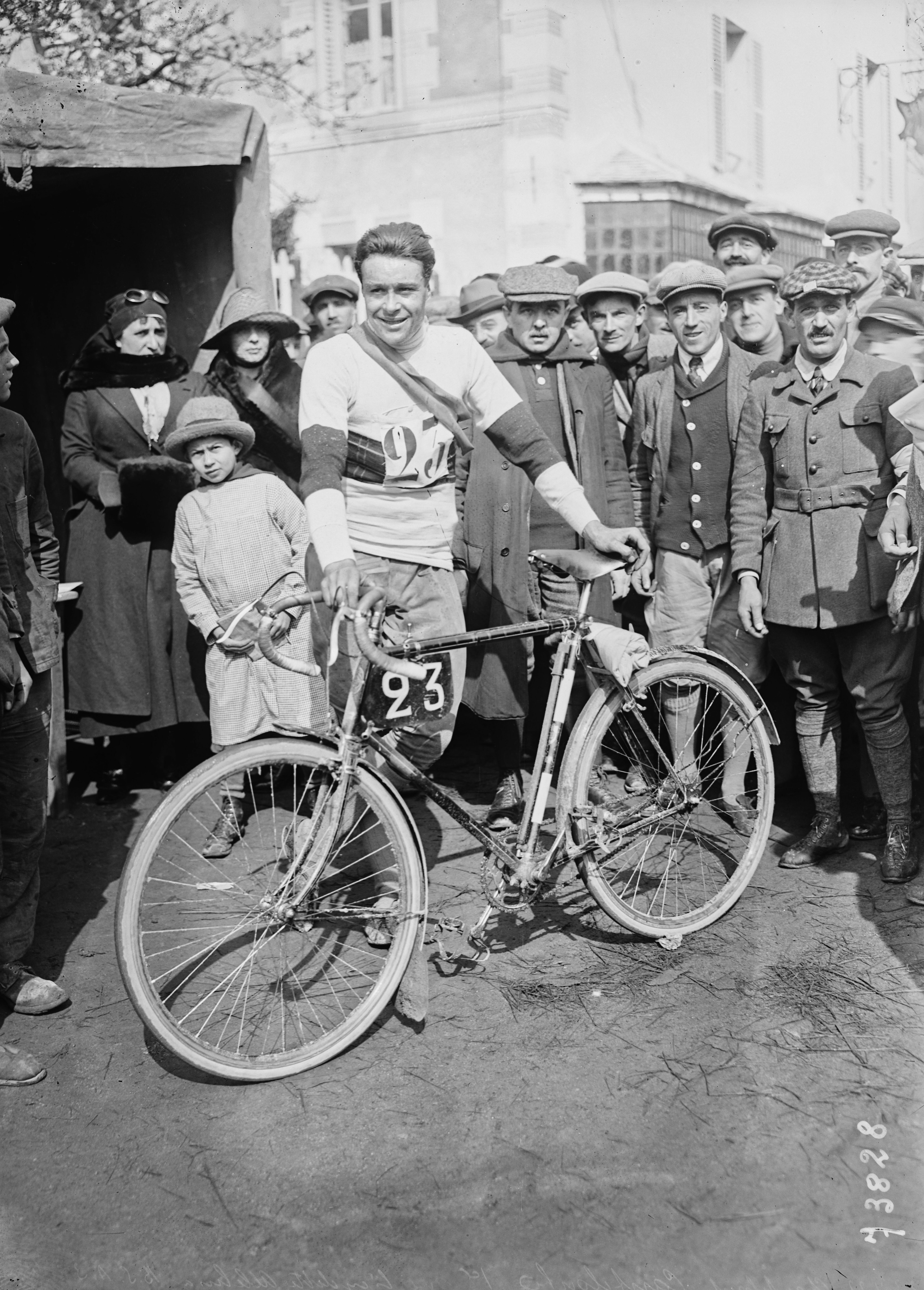 23-4-22, Chanteloup [championnat de la polymultipliée] Canteloube, 1er sur bicyclette Alléluia B. S. A. 3 vitesses : [photographie de presse] / [Agence Rol]